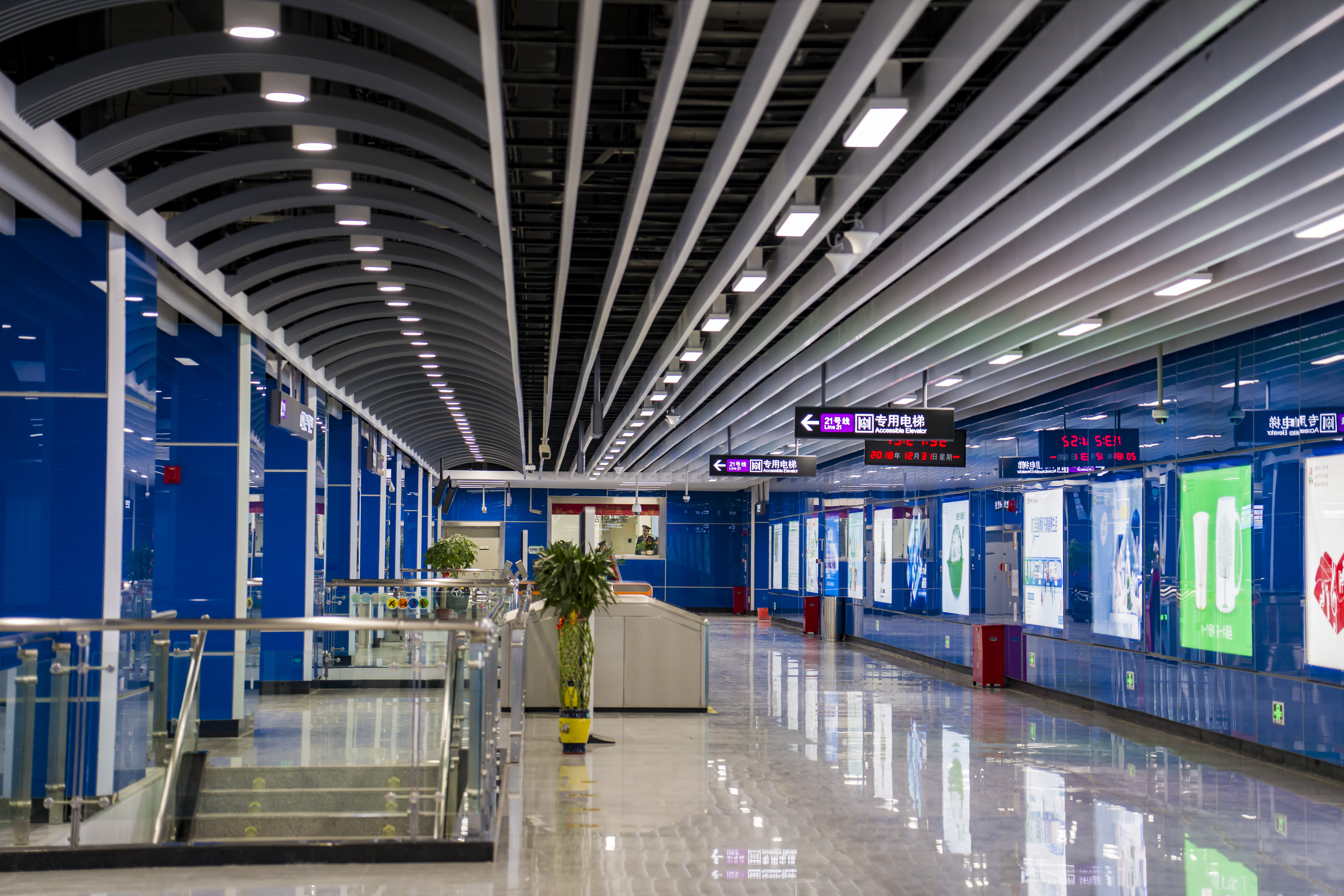 镇龙西站站厅